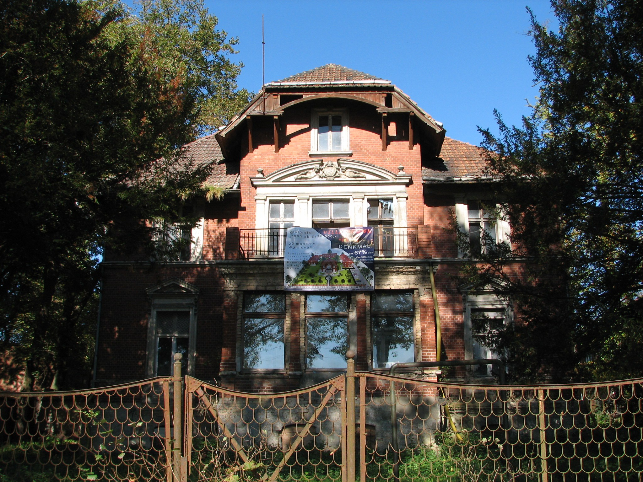 A villa next to the racing track in Hoppegarten.